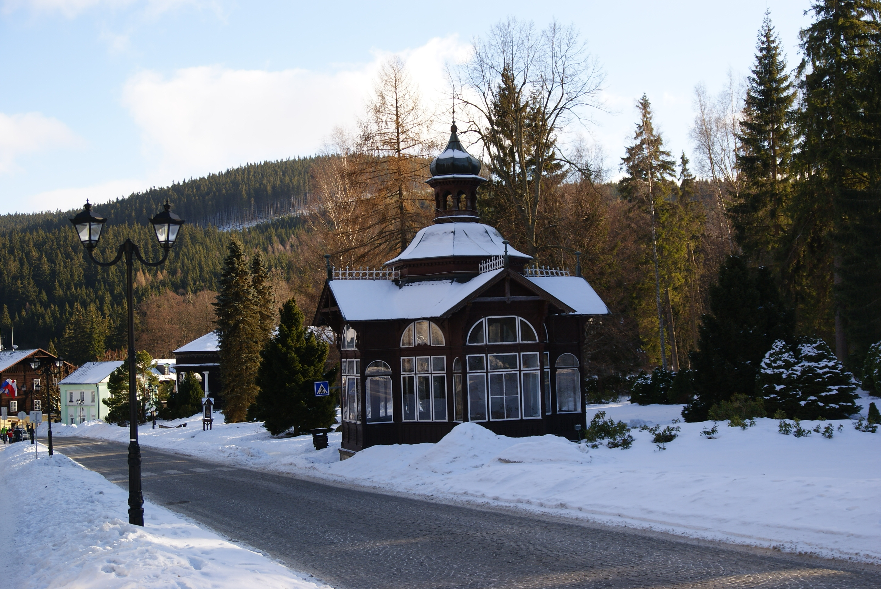 Lázeňský dům - soubor lázeňských domů čp. 1, 3, 27, dům bez čp. "Pitný pavilon" (Karlova Studánka), Karlova Studánka 1